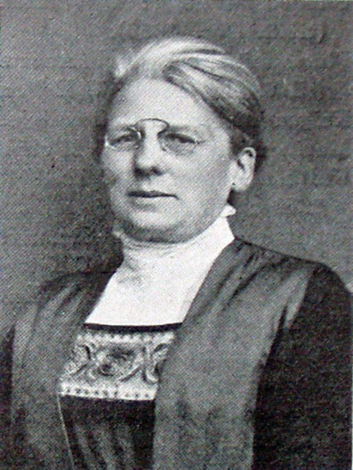 Nina Bang (6. oktober 1866 - 25. marts 1928), Danmarks første kvindelige minister.